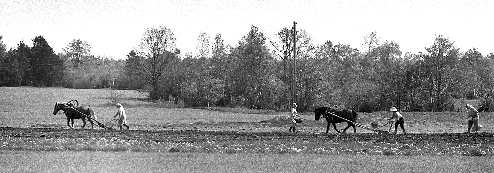 Kündmine Saaremaal 74 (1)